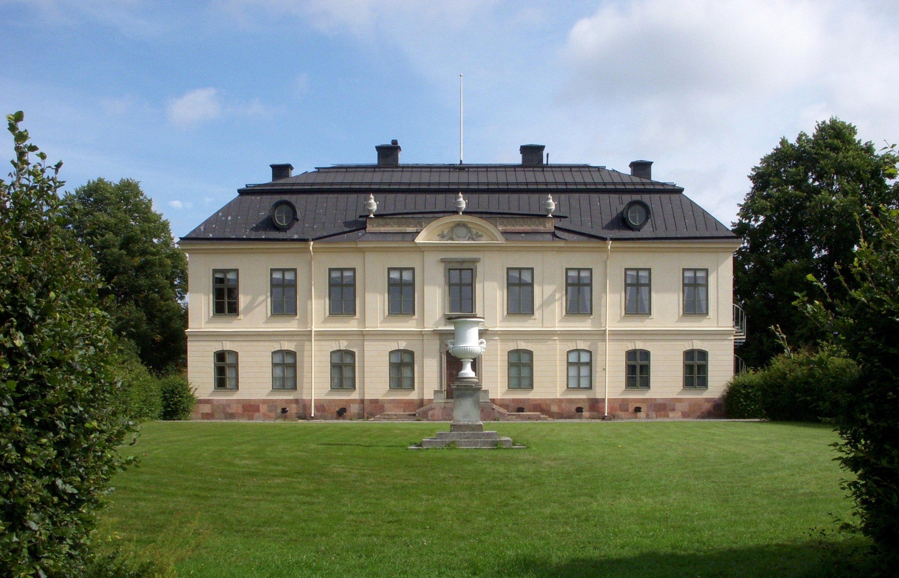 Sturehov, fasad mot väst